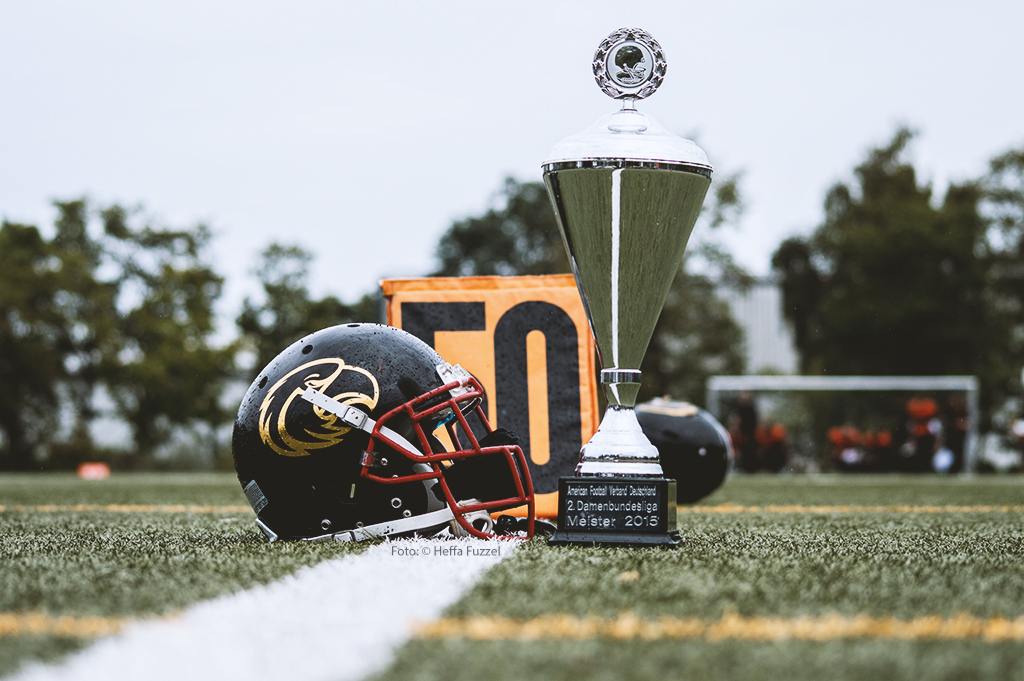 Pokal DBL2 2. Damenbundesliga Football 2015